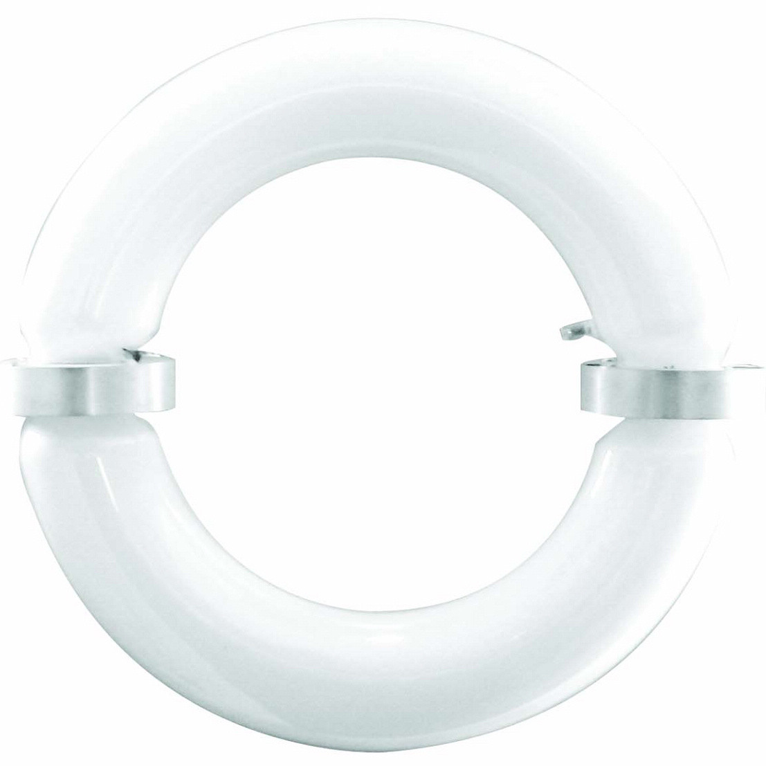 lampe à induction à basse fréquence en forme de Saturne.